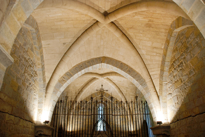 Capilla románica de San Jesucristo. Siglo XII. Catedral de Pamplona, Navarra.